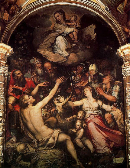 Esta obra, que está colocada en el centro del altar de la Concepción de la catedral de Sevilla, (España), fue pintada en 1561 por el pintor Luis de Vargas.